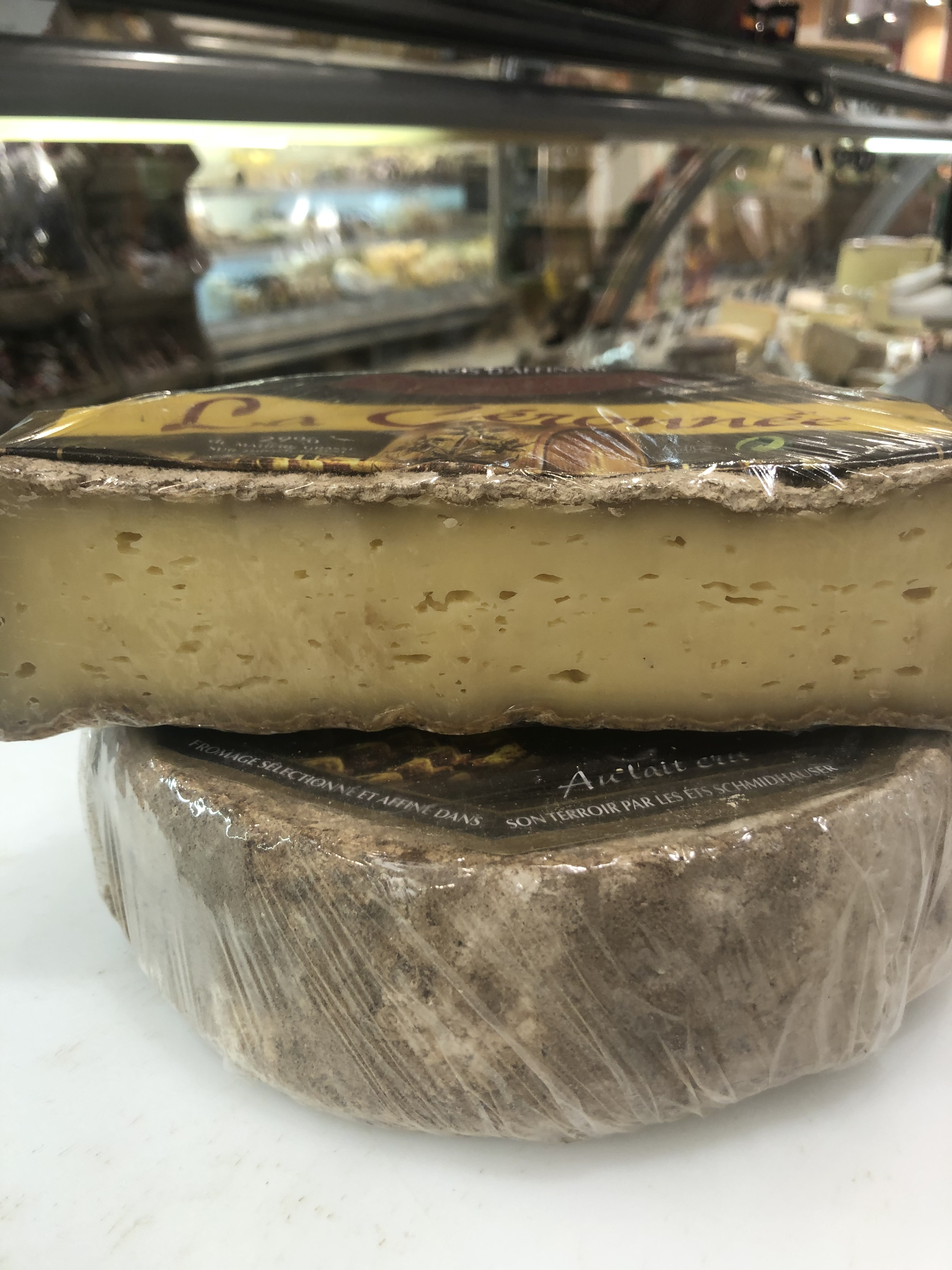 Tomme Céronnée , découpé en deux